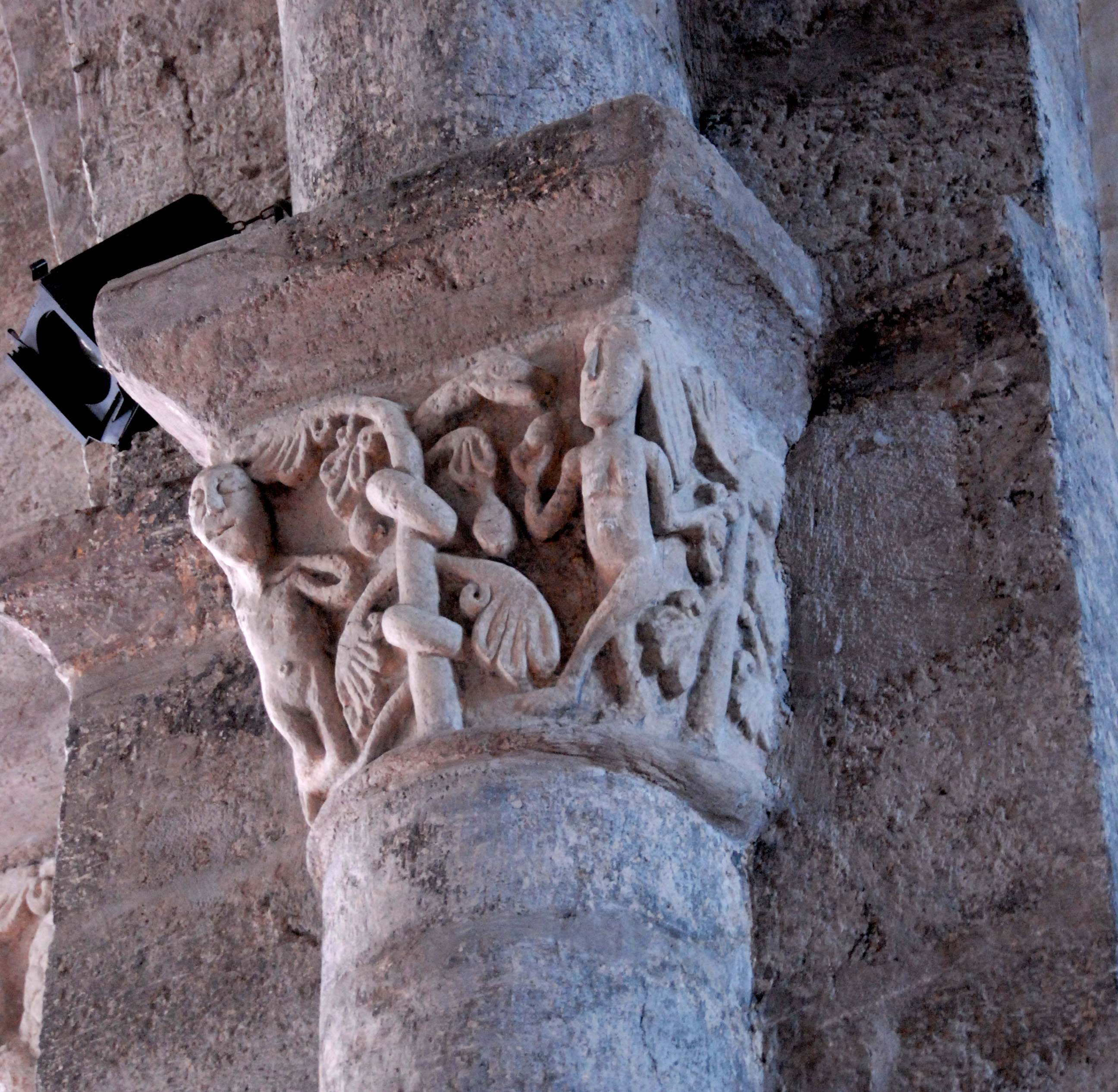 Abteikirche St.-André Lavaudieu, Kapitell, Sündenfall